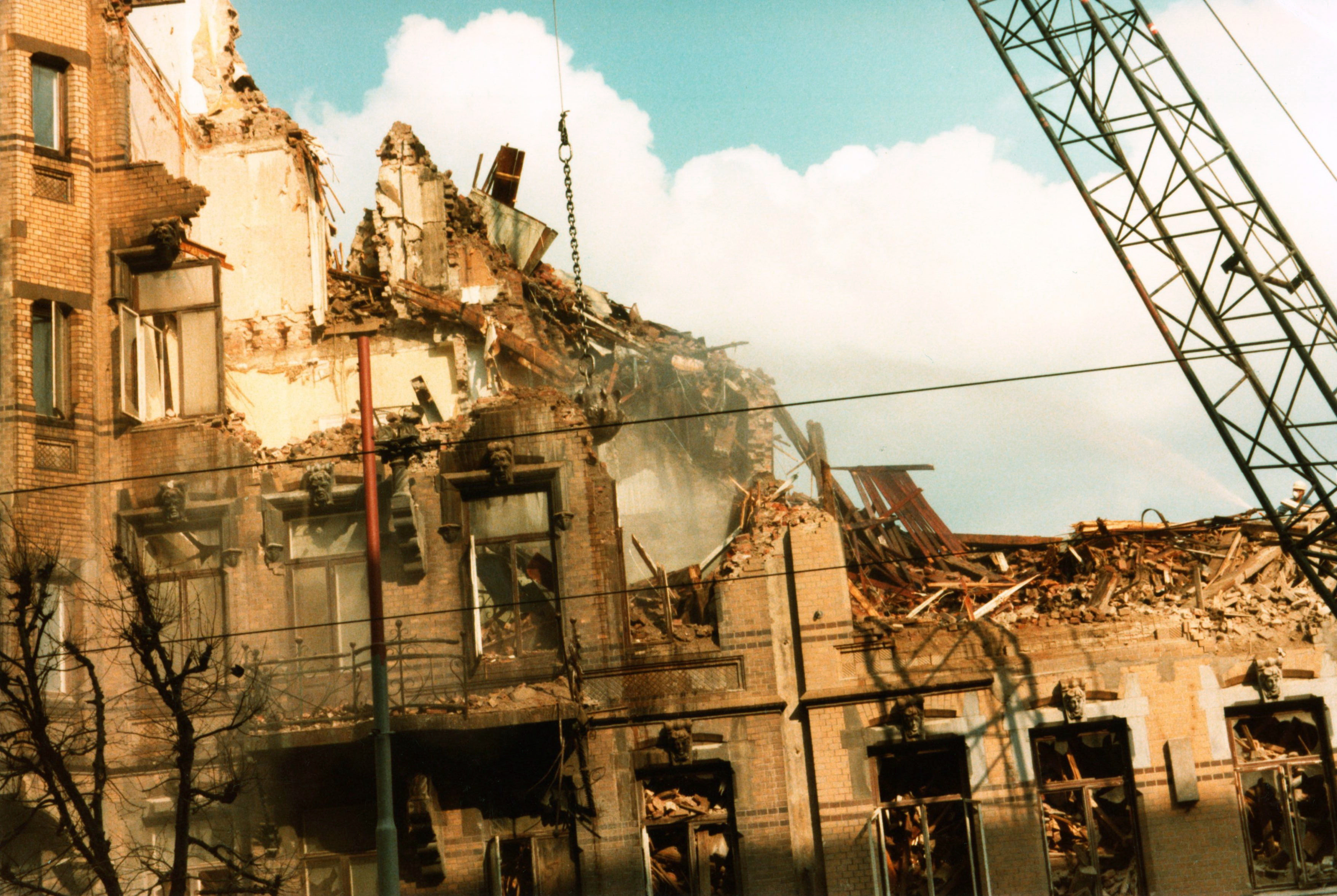 Linnégatan (ca 1978), nedre innerkröken